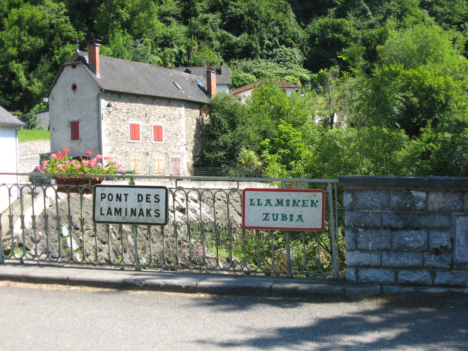 Pont des lamiñak à Licq-Atherey en Soule (Pyrénées-Atlantiques) (Pyrénées).